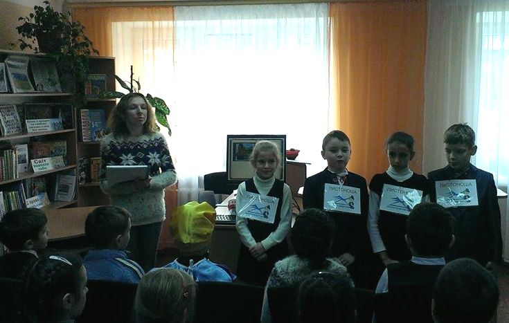 Метою заходу було залучити нових читачів, зацікавити дітей чарівним світом книги, навчити працювати та спілкуватися з книгою, усвідомлювати велике значення книги, а також подарувати дітям радість свята. Бібліотека-філія №4 Хмельницької міської ЦБС